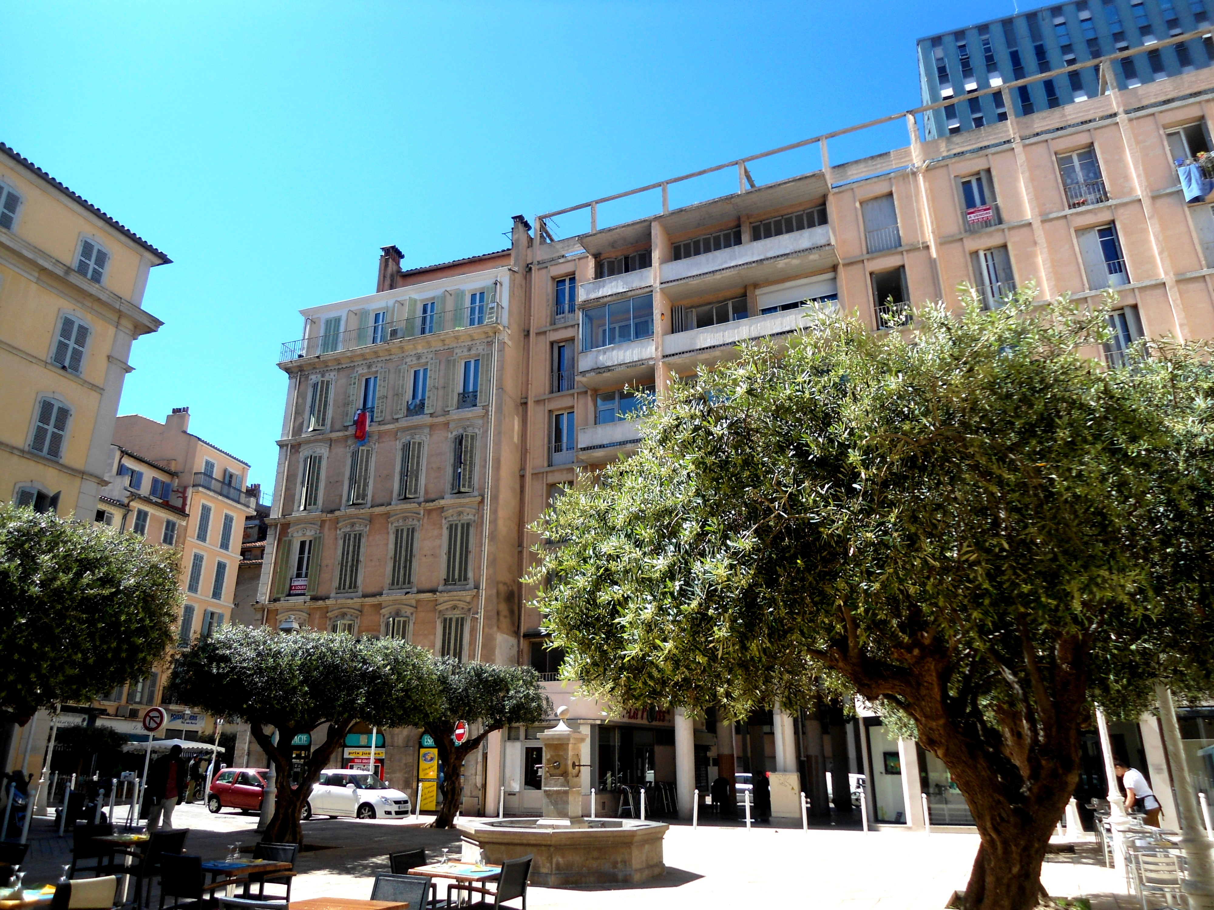 plaça d'oli, Tolon